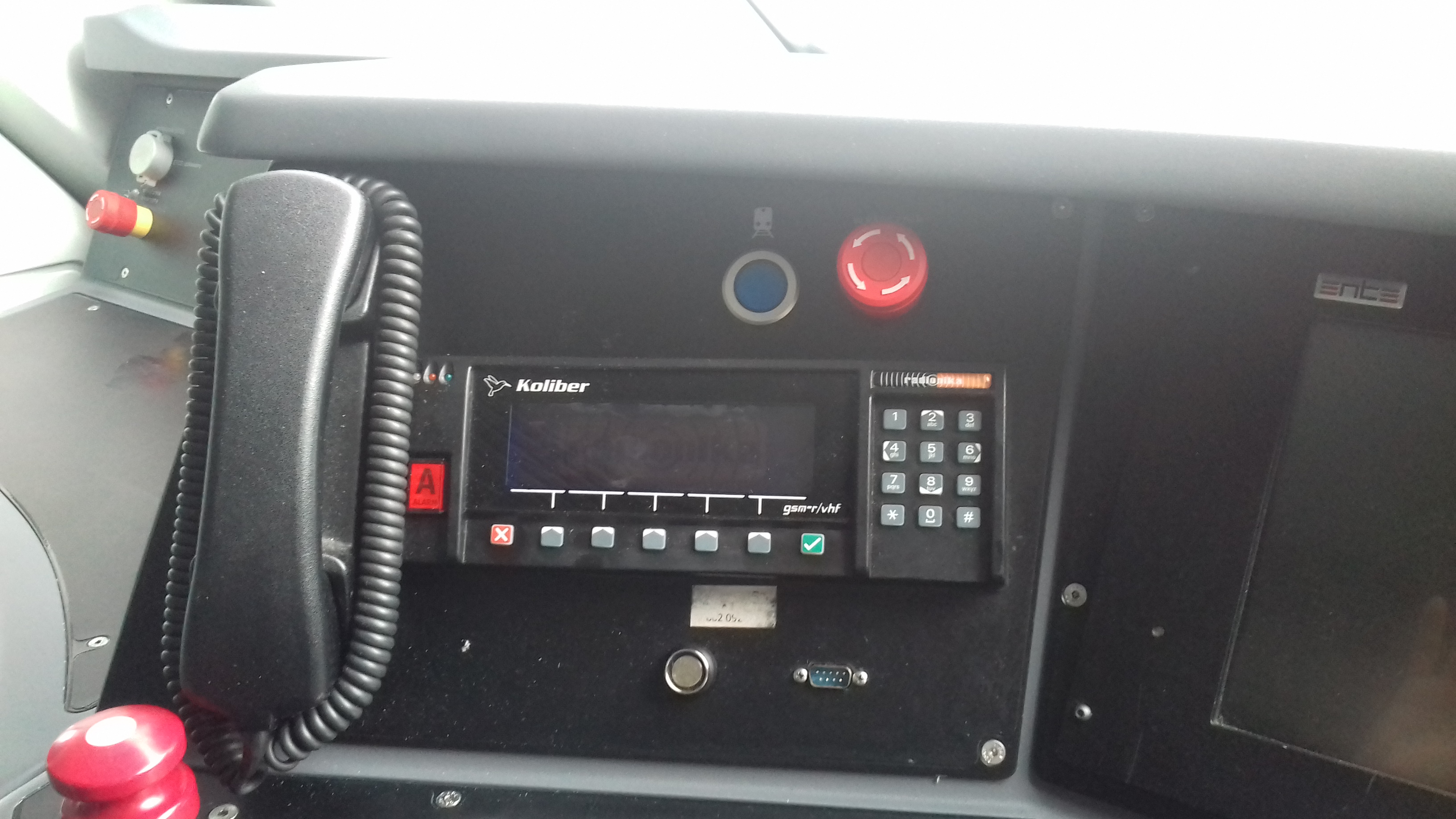 Manipulator radiotelefonu Koliber VHF/GSM-R w kabinie pojazdu szynowego Impuls 45WE